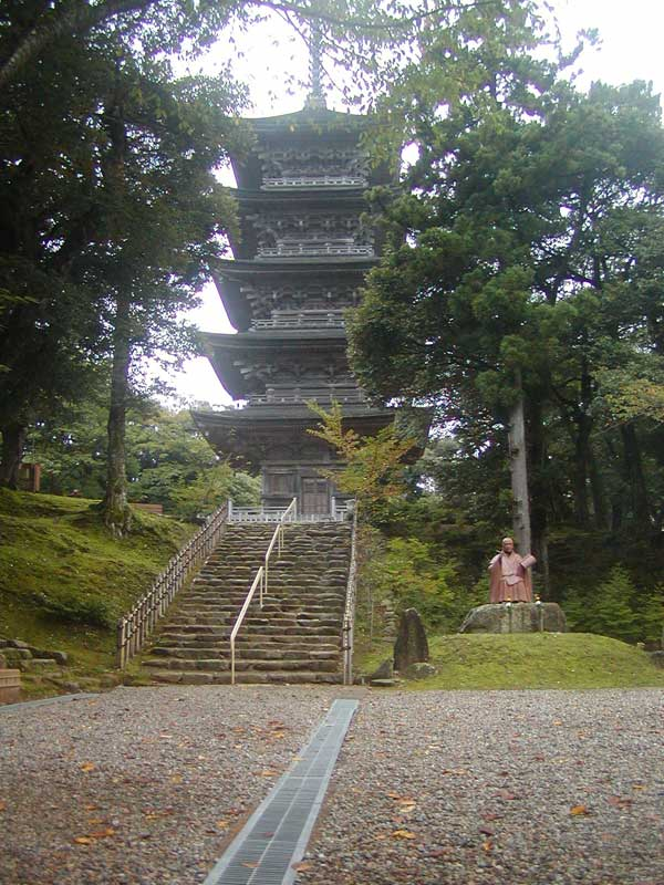 Myojoji temple